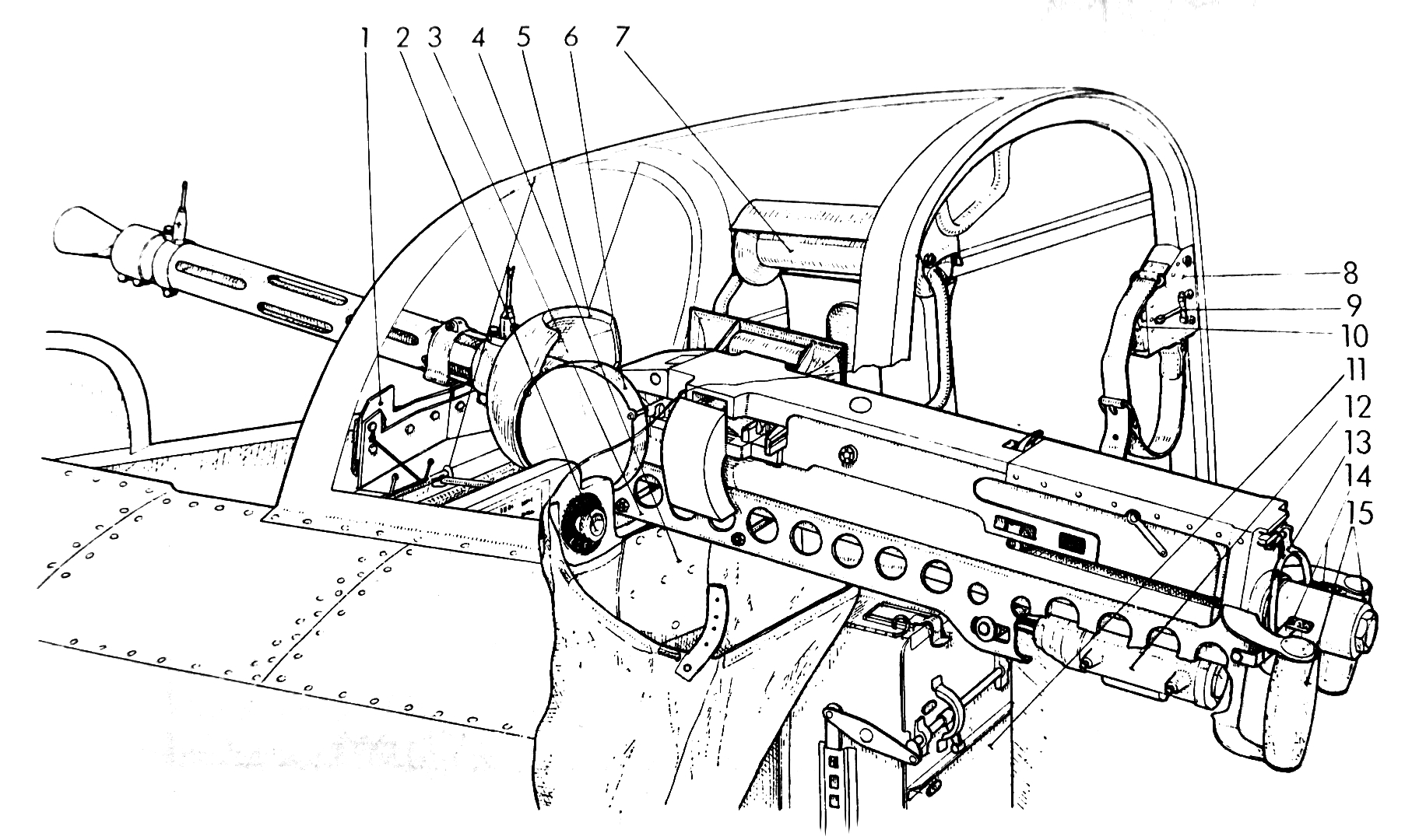 Signalistkanonen på Saab 18. I princip identisk på alla versioner.